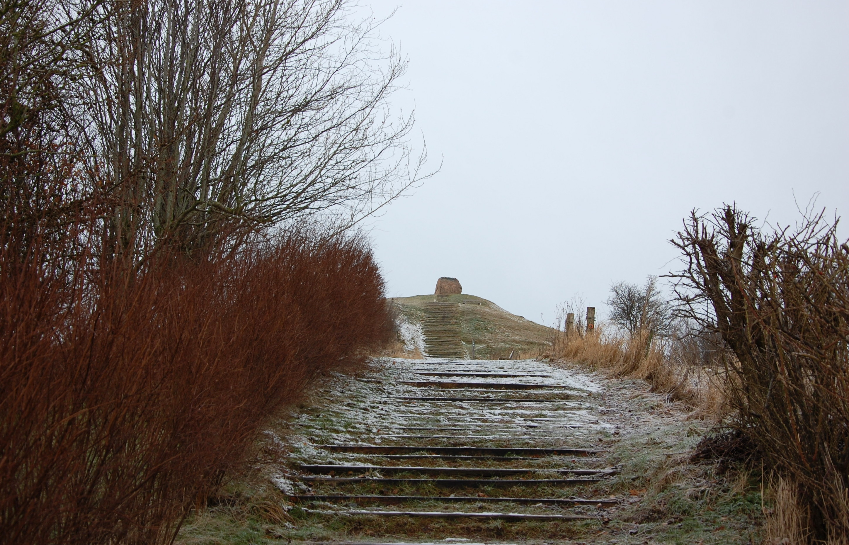 Esterhoj Aufgang